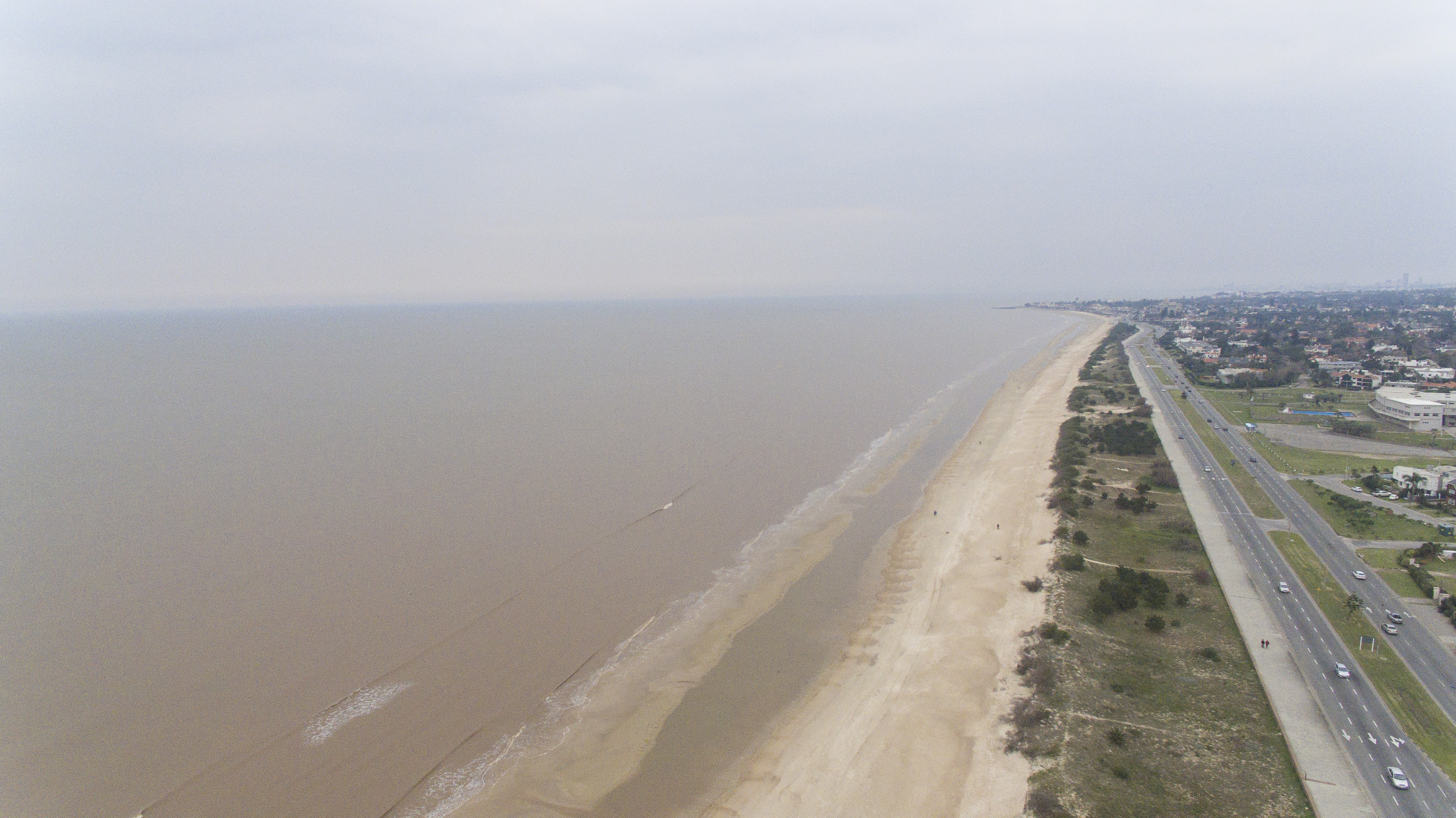 Playa Carrasco, toma aérea, Montevideo, Uruguay